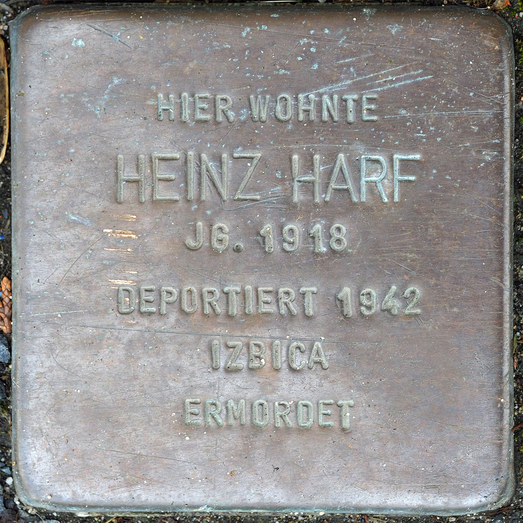 Stolpersteine MG: Harf, Heinz